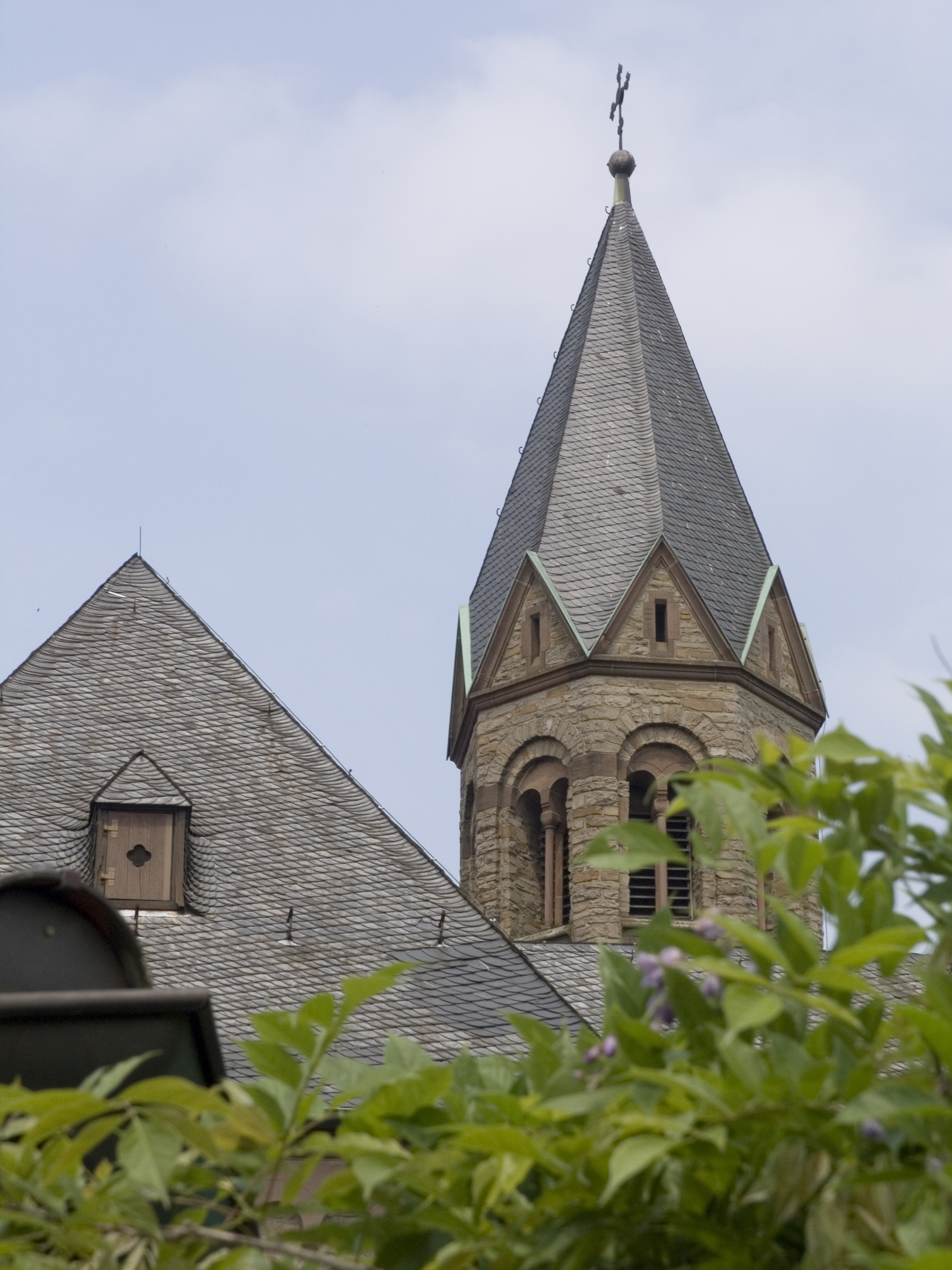 Северный Рейн - Вестфалия, Мюльхайм-на-Руре - Цистерцианский монастырь в Саарне